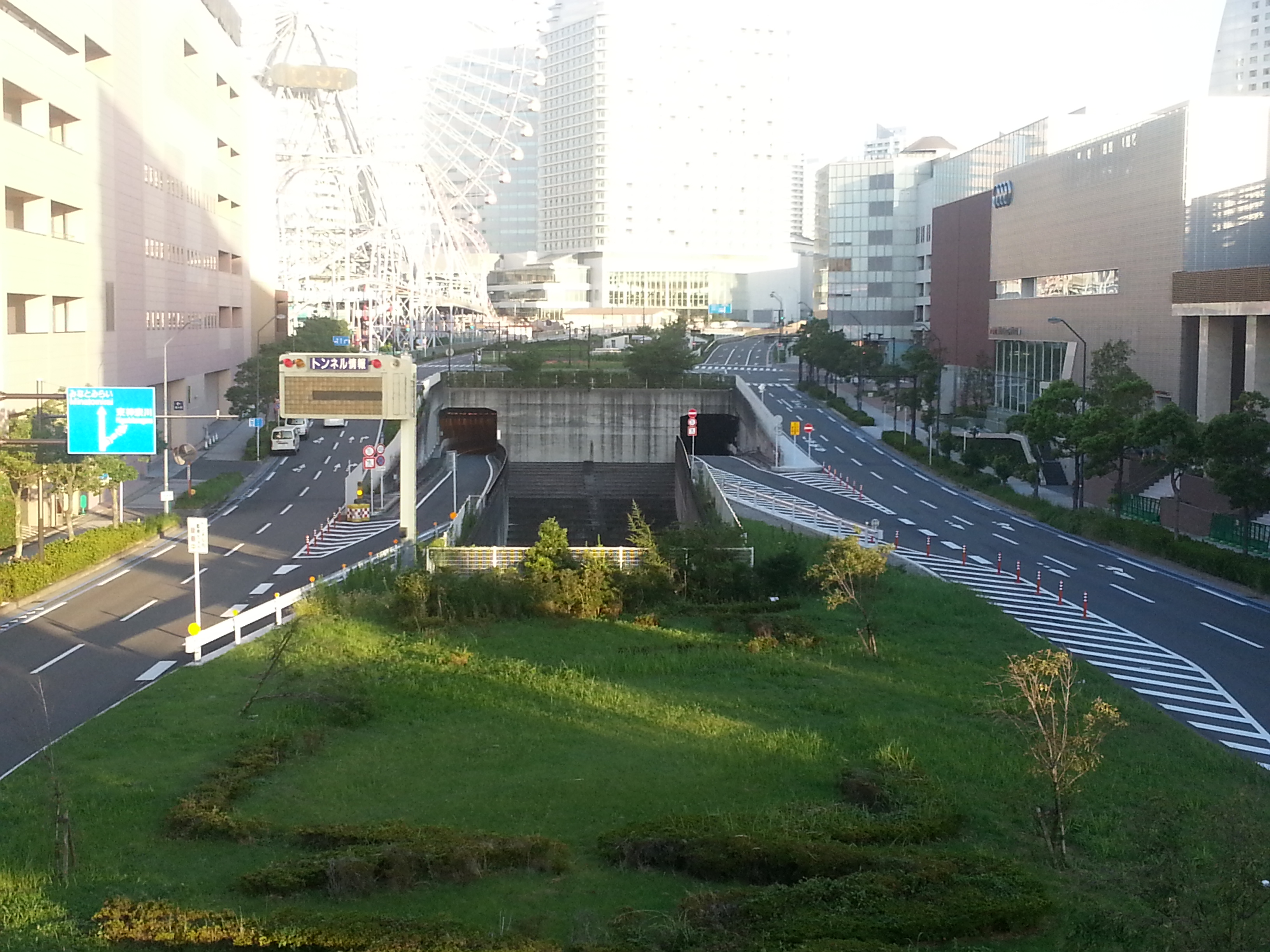 横浜臨港幹線道路「みなとみらいトンネル」のワールドポーターズ側出入り口、開通後の様子。サークルウォークより2013年9月撮影。